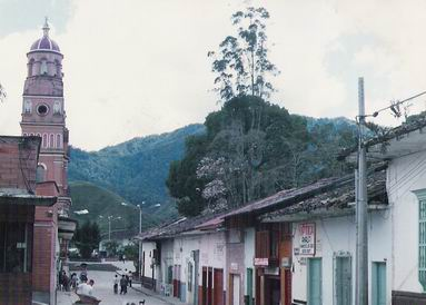 Fotografía personas, Albeiro Rodas, del municipio de Amalfi, para el artículo pertinente. Donación a la wikipedia.